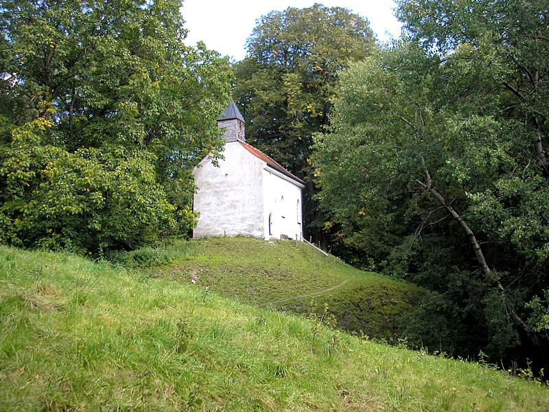 Kapelle St. Georg bei Peißenberg (Landkreis Weilheim-Schongau, Oberbayern). Ansicht von Südwesten. Eigene Aufnahme, August 2007 / St. George's chapel near Peissenberg (Upper Bavaria, Germany). View from south-west. Own photo, Aug. 2007